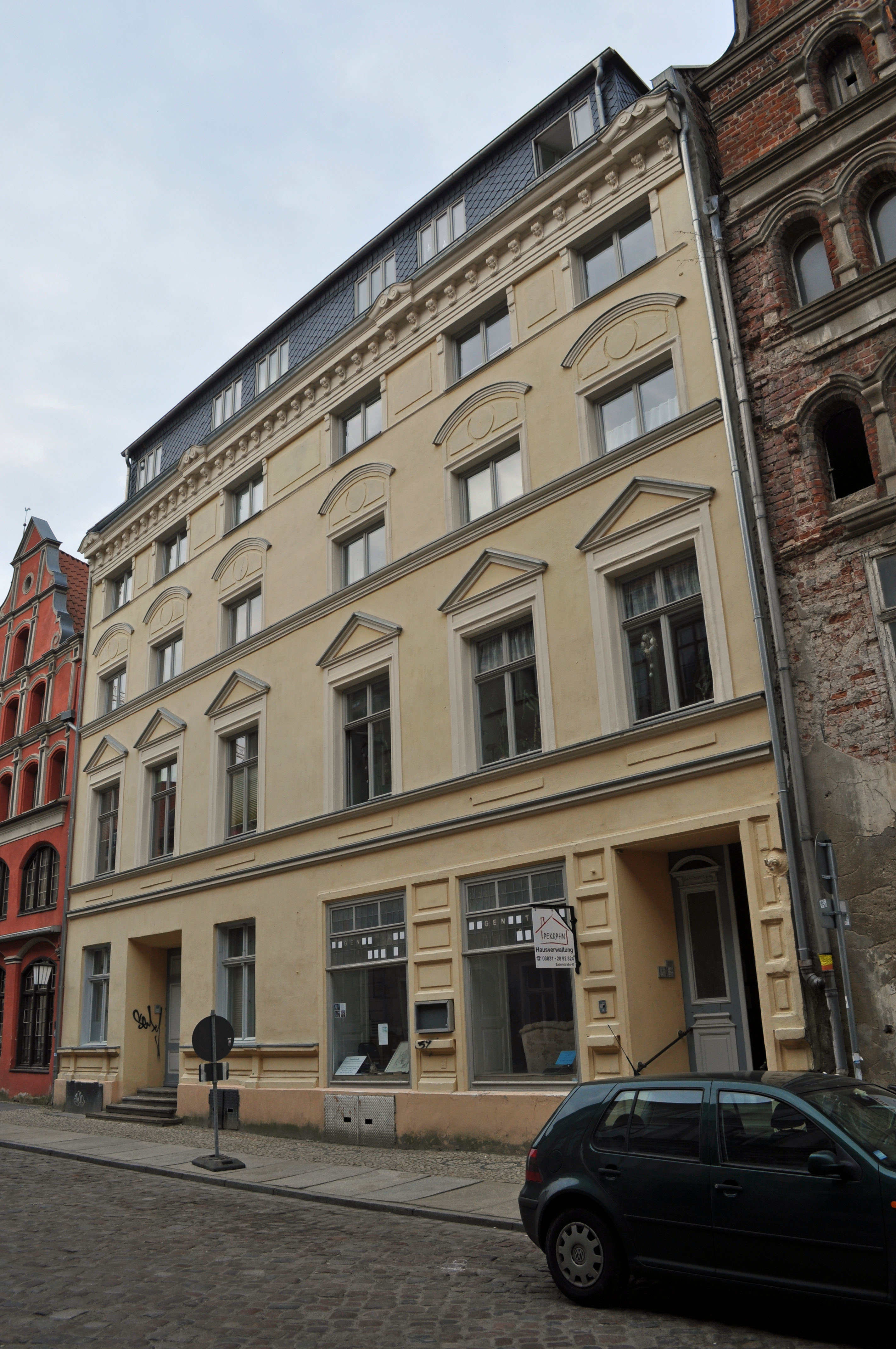 Gebäude bzw. Gebäudedetail in Stralsund. Straße und Hausnummer siehe Dateiname.